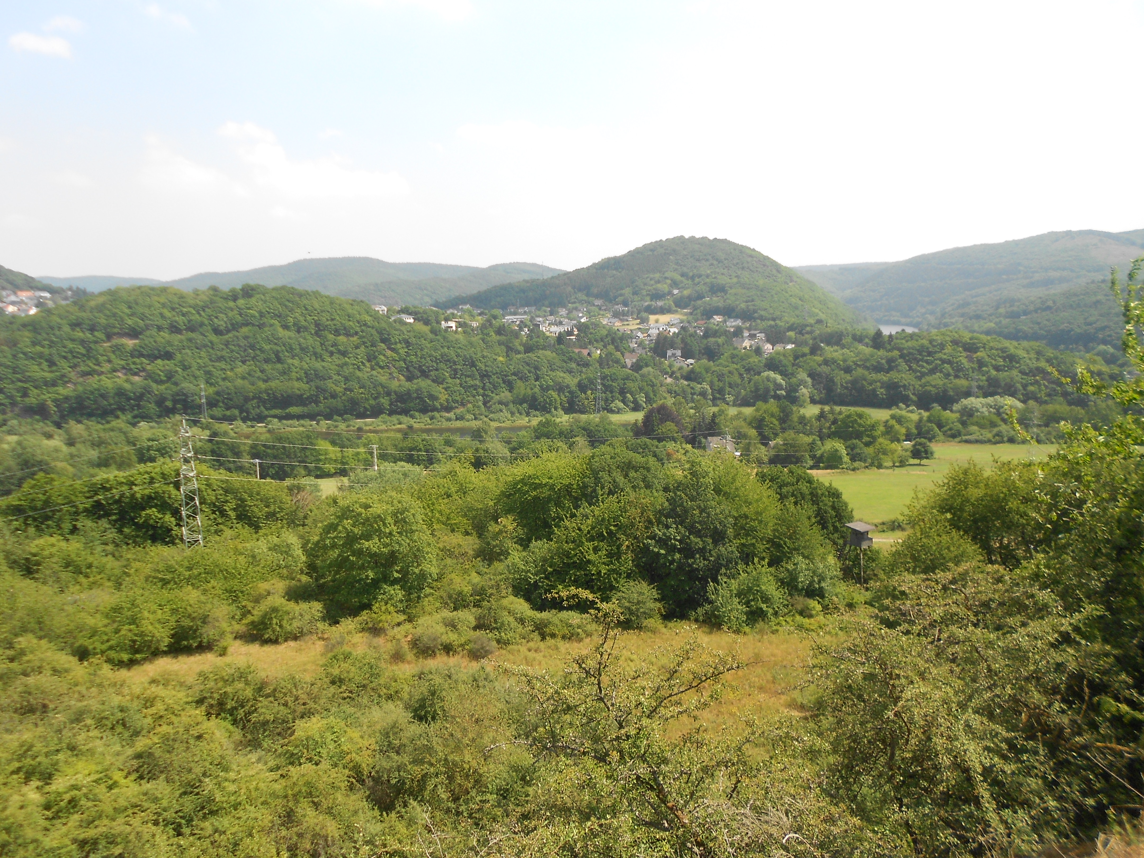 Nationalpark Eifel, Nordeifel, Kreis Euskirchen, Nordrhein-Westfalen (Deutschland), Nordrhein-Westfalen (Deutschland).